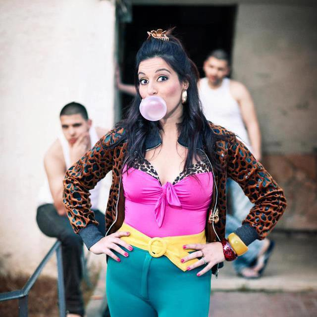 פרופיל גולדי